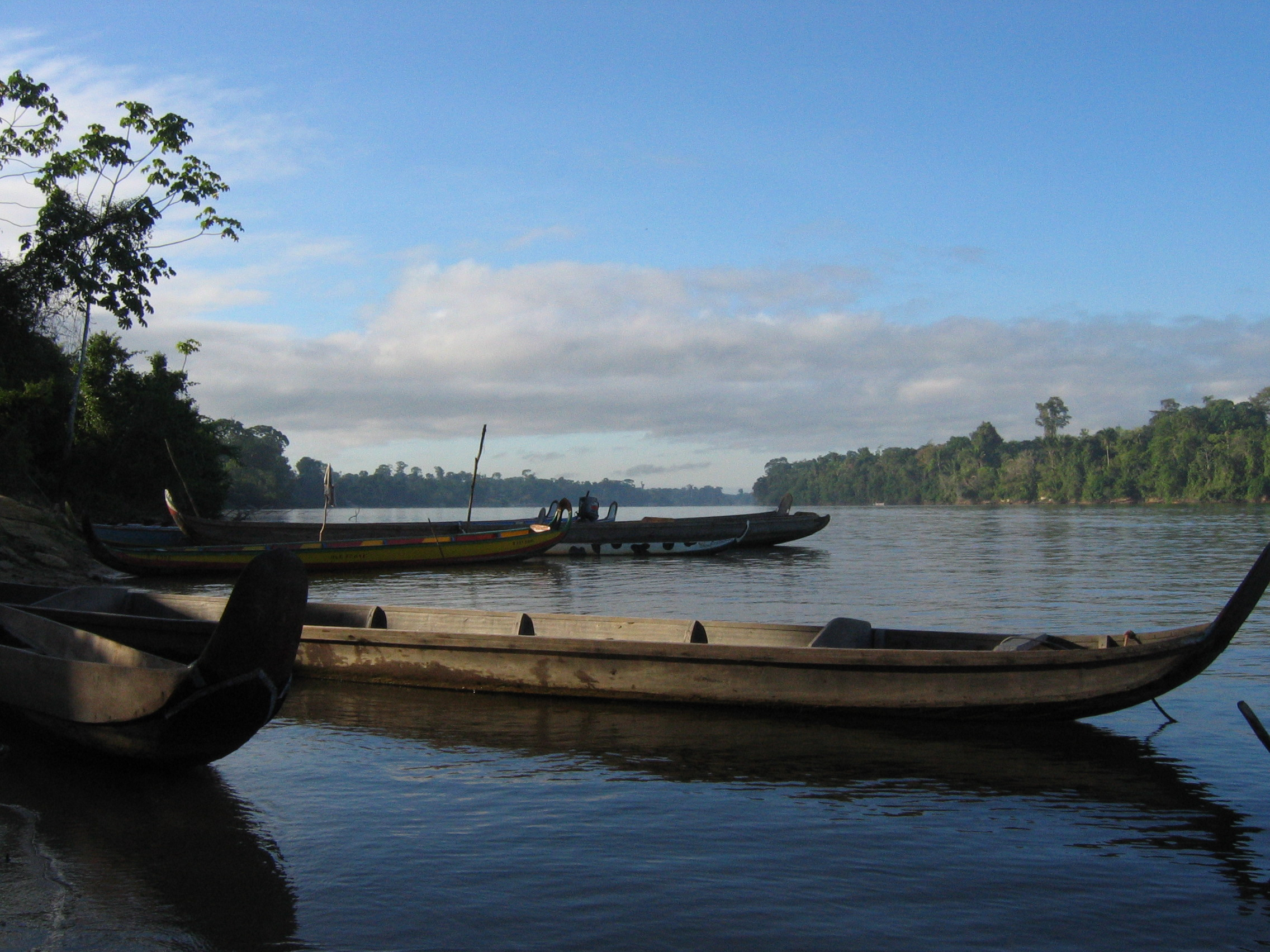 Grand Santi, vue du fleuve au petit matin